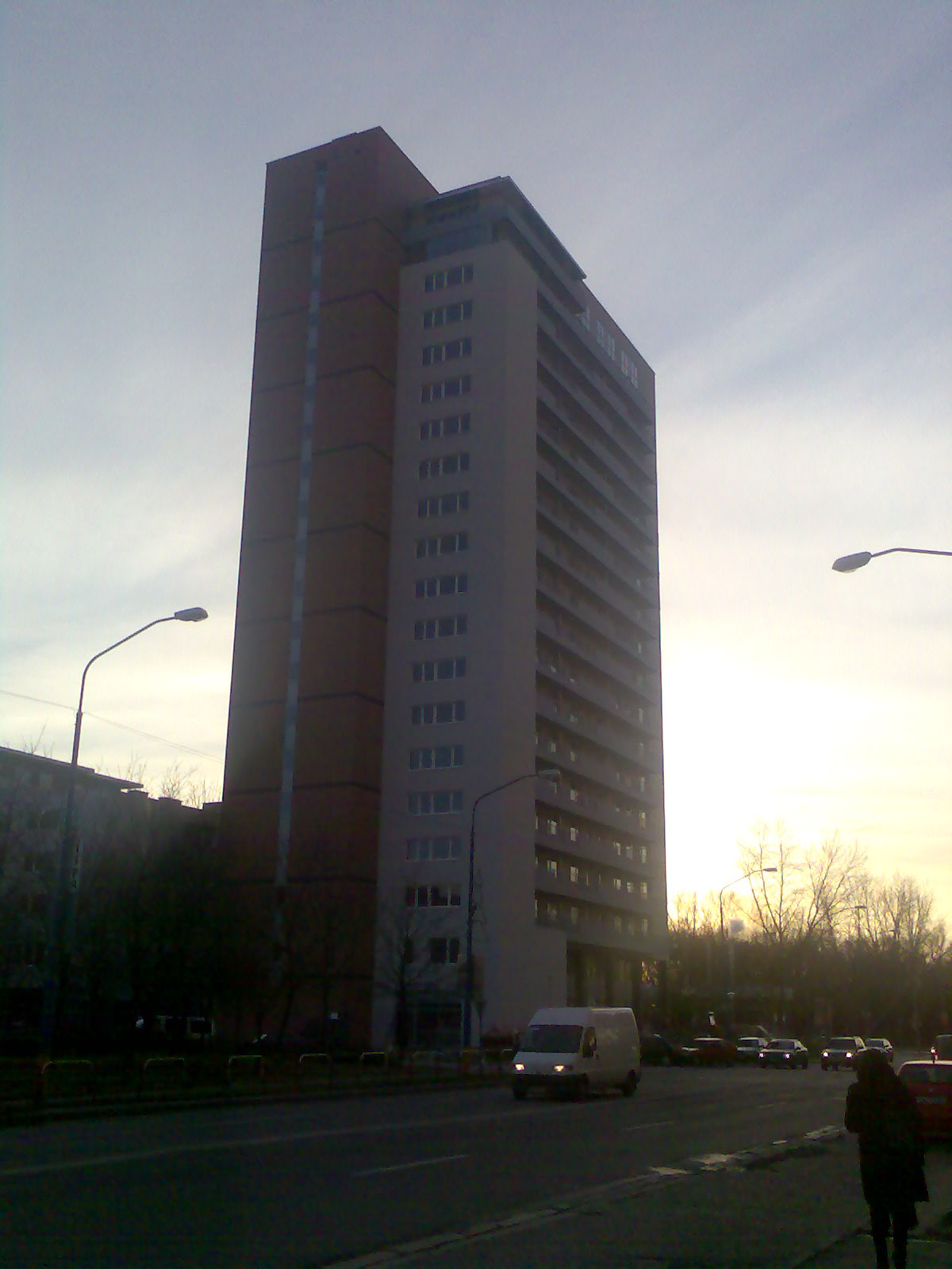 Výšková budova Dominant.